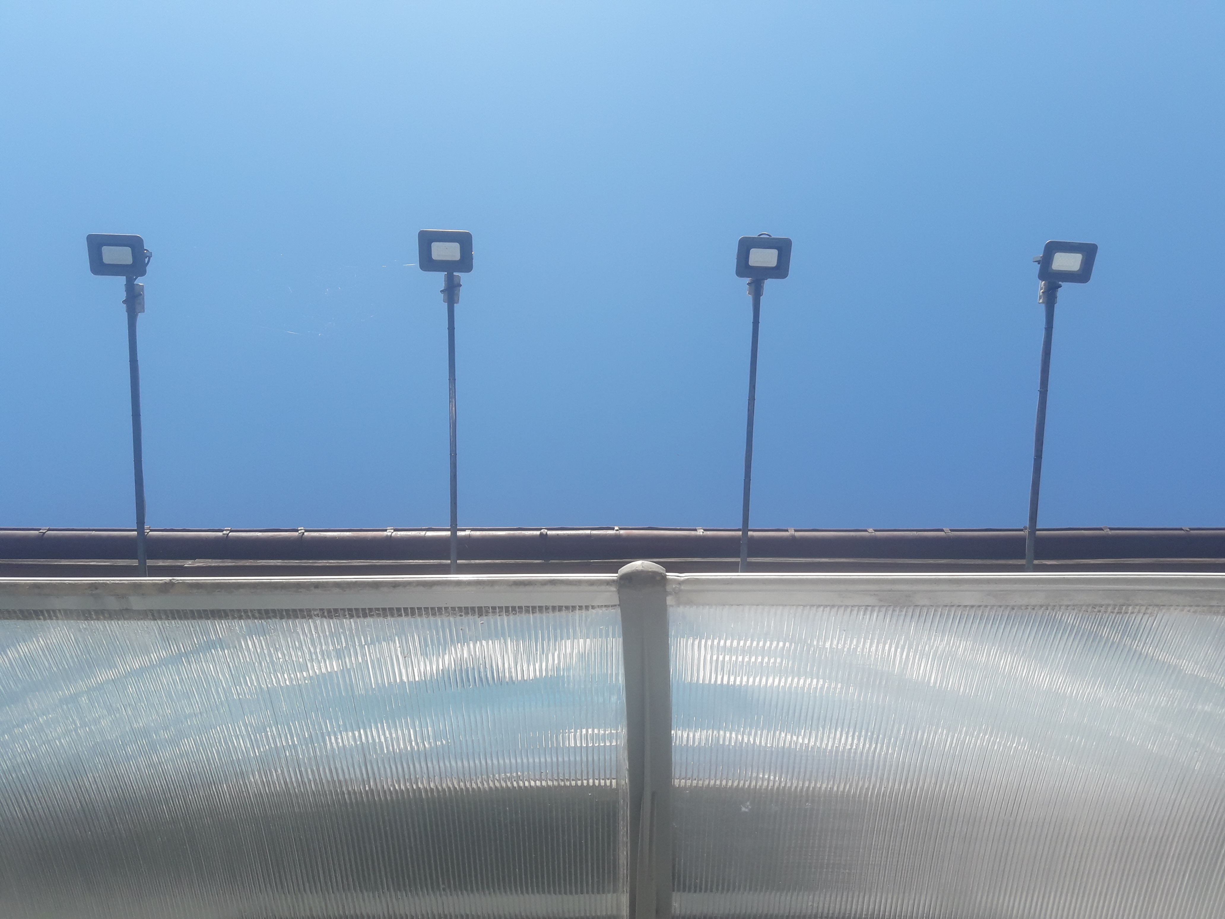 Wykorzystanie halogenów LED w oświetleniu elewacji